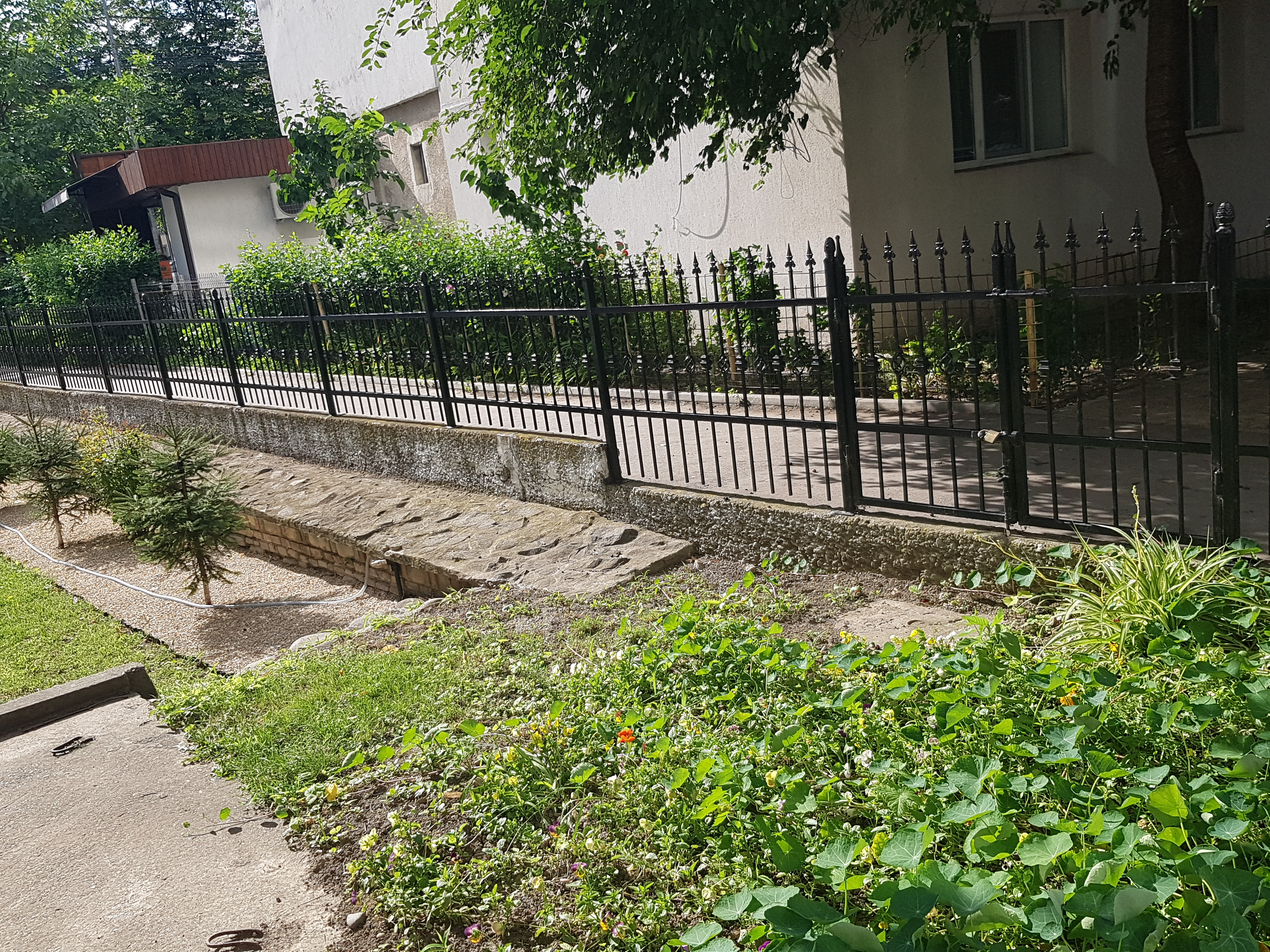 Zid de incintă 02